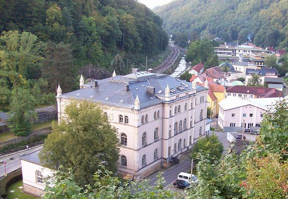 TU Dresden, Fachrichtung Forstwissenschaften, Campus Altbau Tharandt